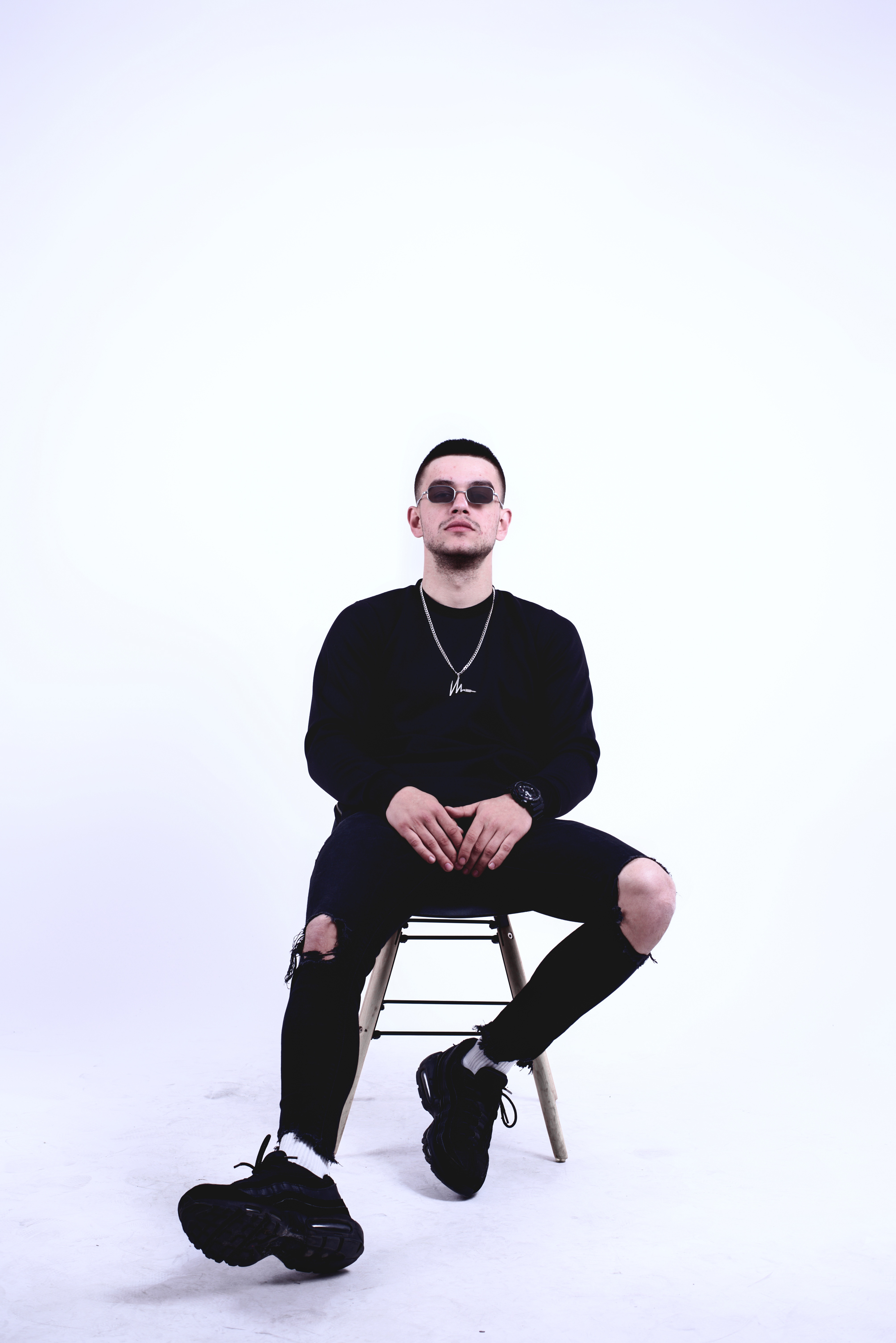 Srpski (latinica): Tasko (reper)